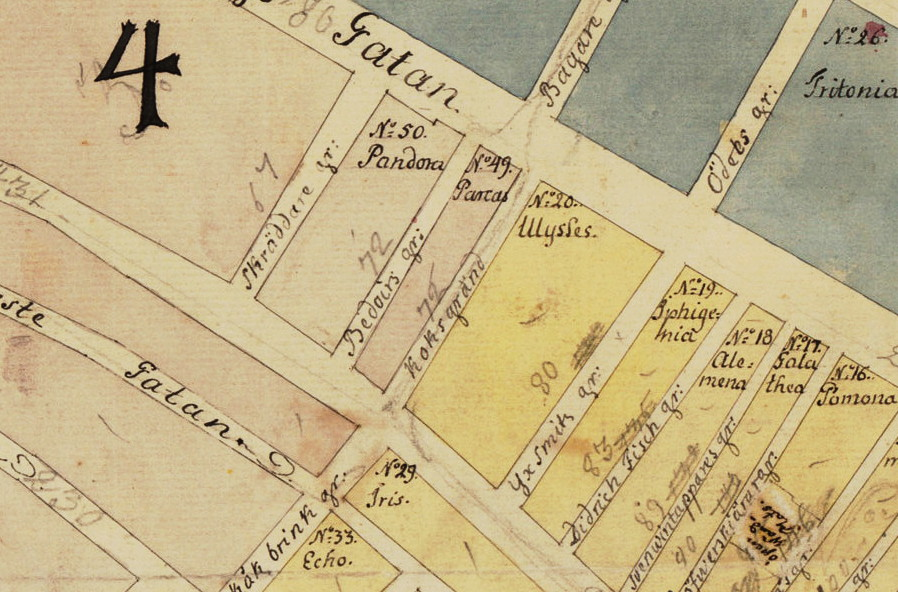 Del av Plan av Stockholms stad mellan norr- och söderström 1733, visande kv. Iphigenia, Ulysses, Parcas, Pandora (norr är nertill)